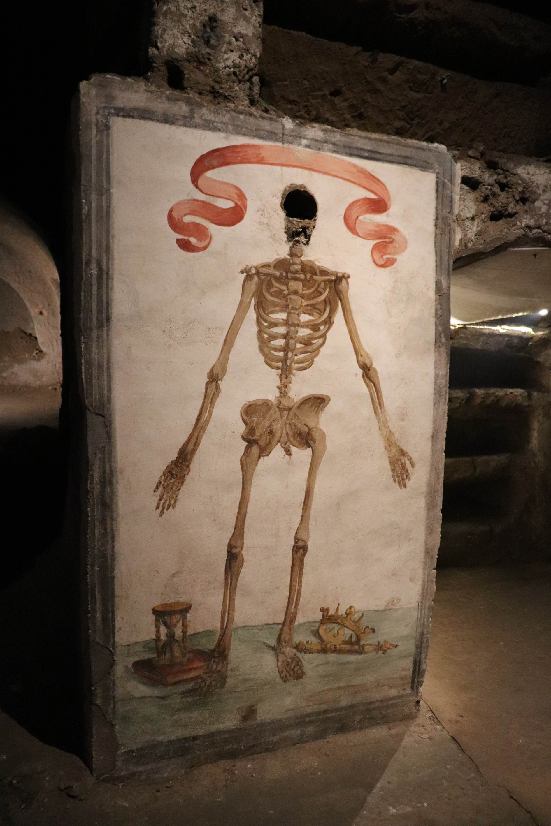 Catacombe di San Gaudioso (Napoli)